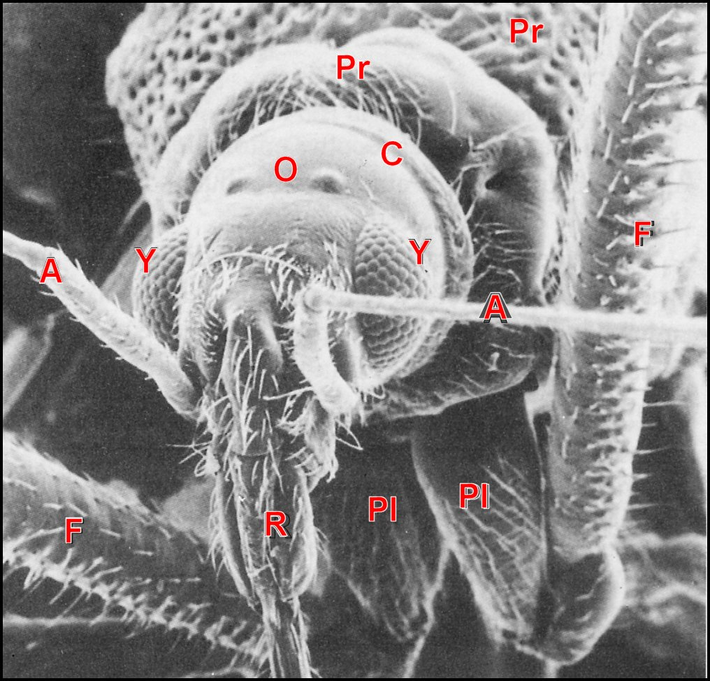 Vue antérieure d' Arachnocoris karukerae au microscope électronique à balayage.